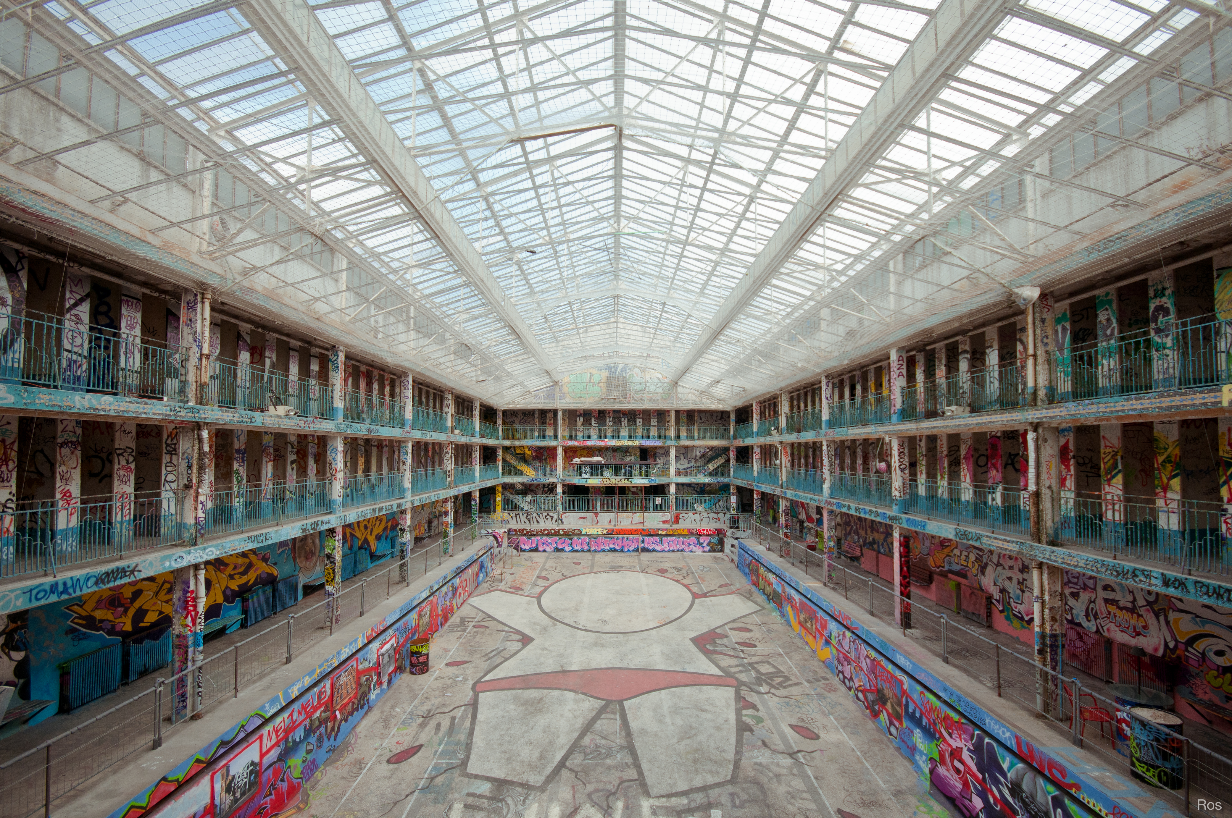 Piscine Molitor, Paris, France. .